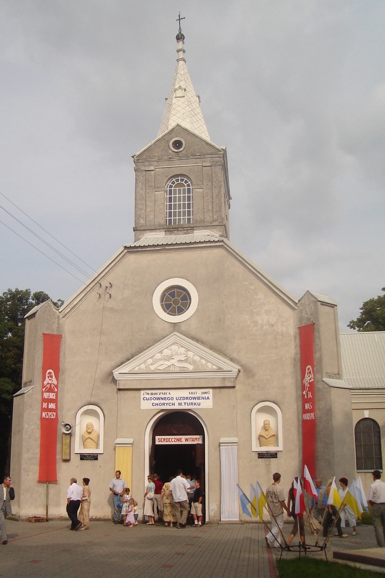 Kościół p.w. Przemienienia Pańskiego i św. Walentego w Galewie 04.1984.